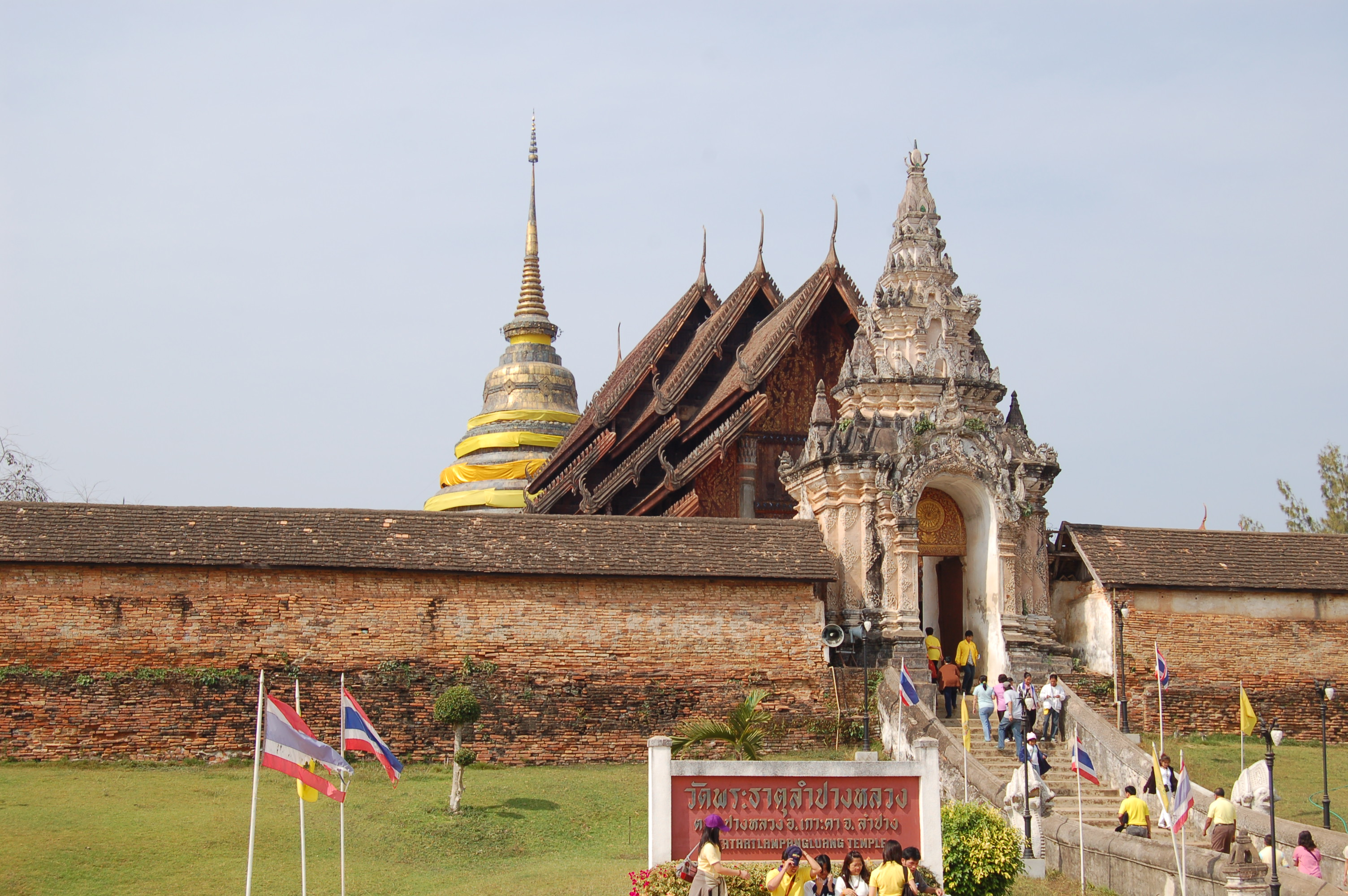 Wat Prathat Lampang Luang, Lampang, Thailand